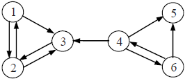 بيجرانك